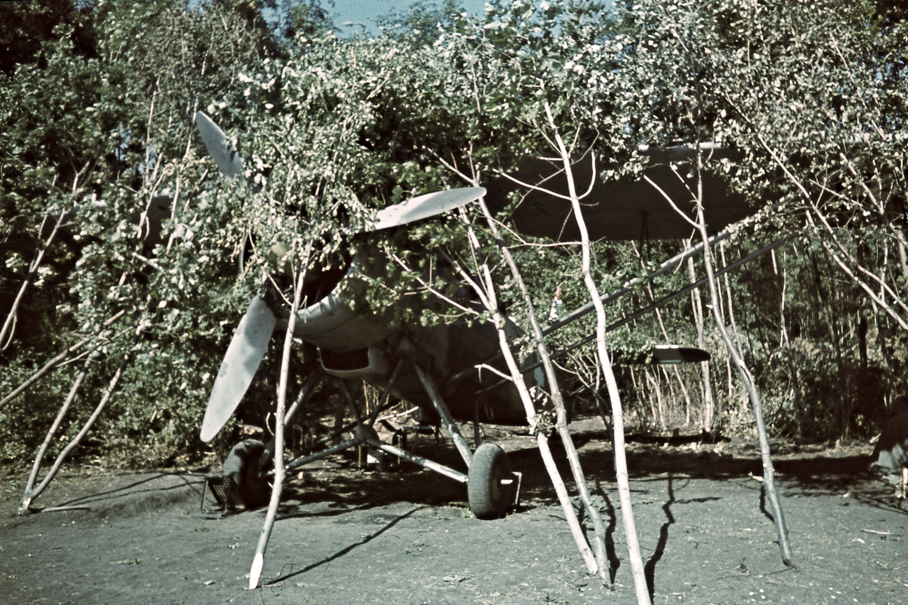 A magyar légierő Heinkel He-46E típusú közelfelderítő repülőgépe. Tags: colorful, Royal Hungarian Air Force, airplane, Heinkel-brand, Gerrman brand, transport, second World War, camouflage Title: A magyar légierő Heinkel He-46E típusú közelfelderítő repülőgépe.